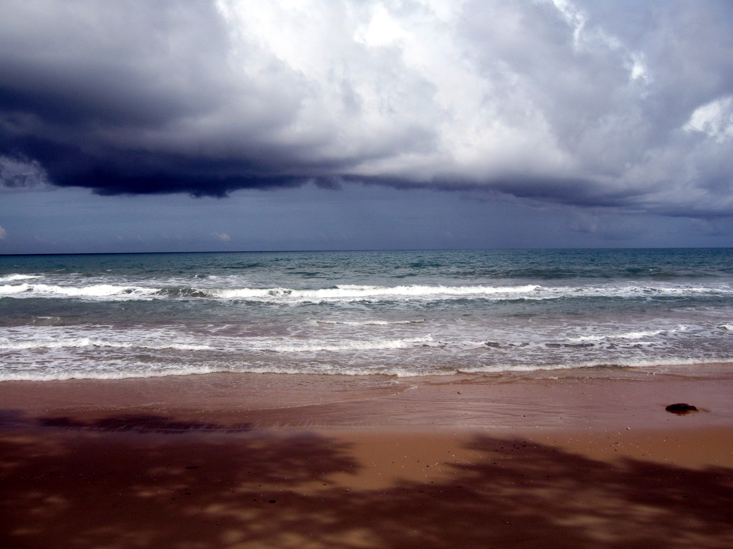 210 Thai Mueang Beach,Phang Nga,THAILAND